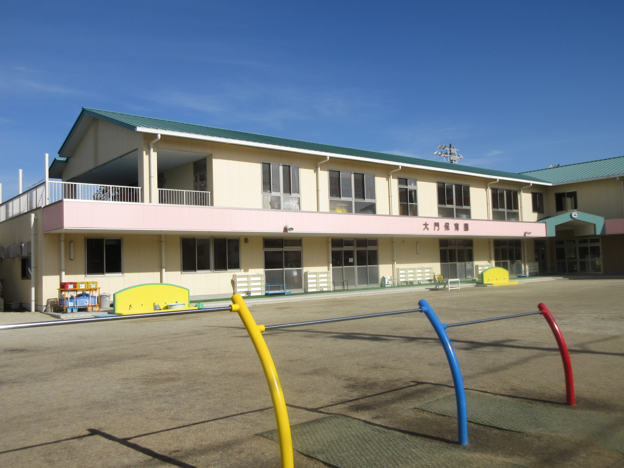 社会福祉法人えこう会大門保育園（岡崎市大門）